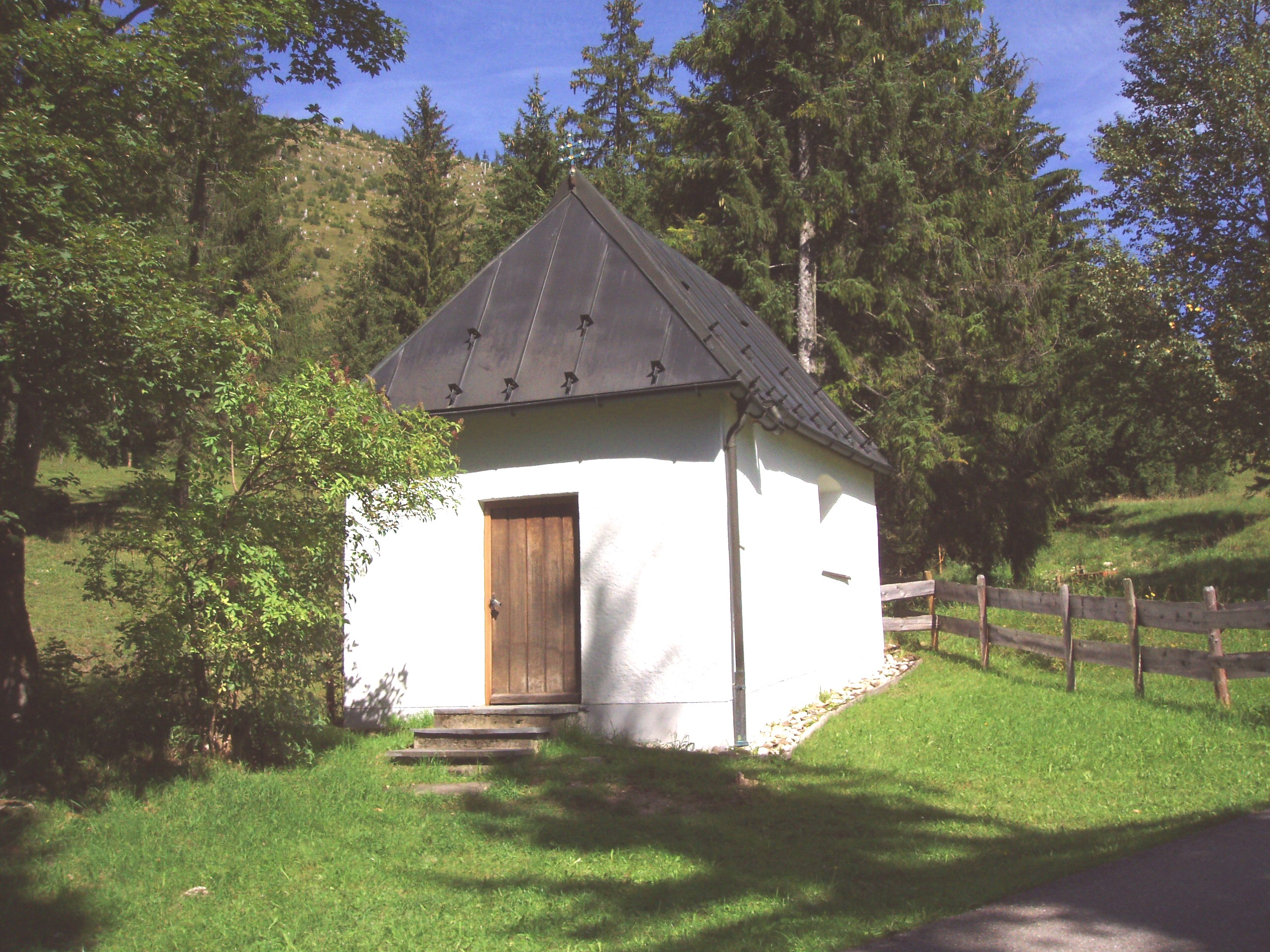 Bildkapelle der Salzfahrer am Oberjochpass